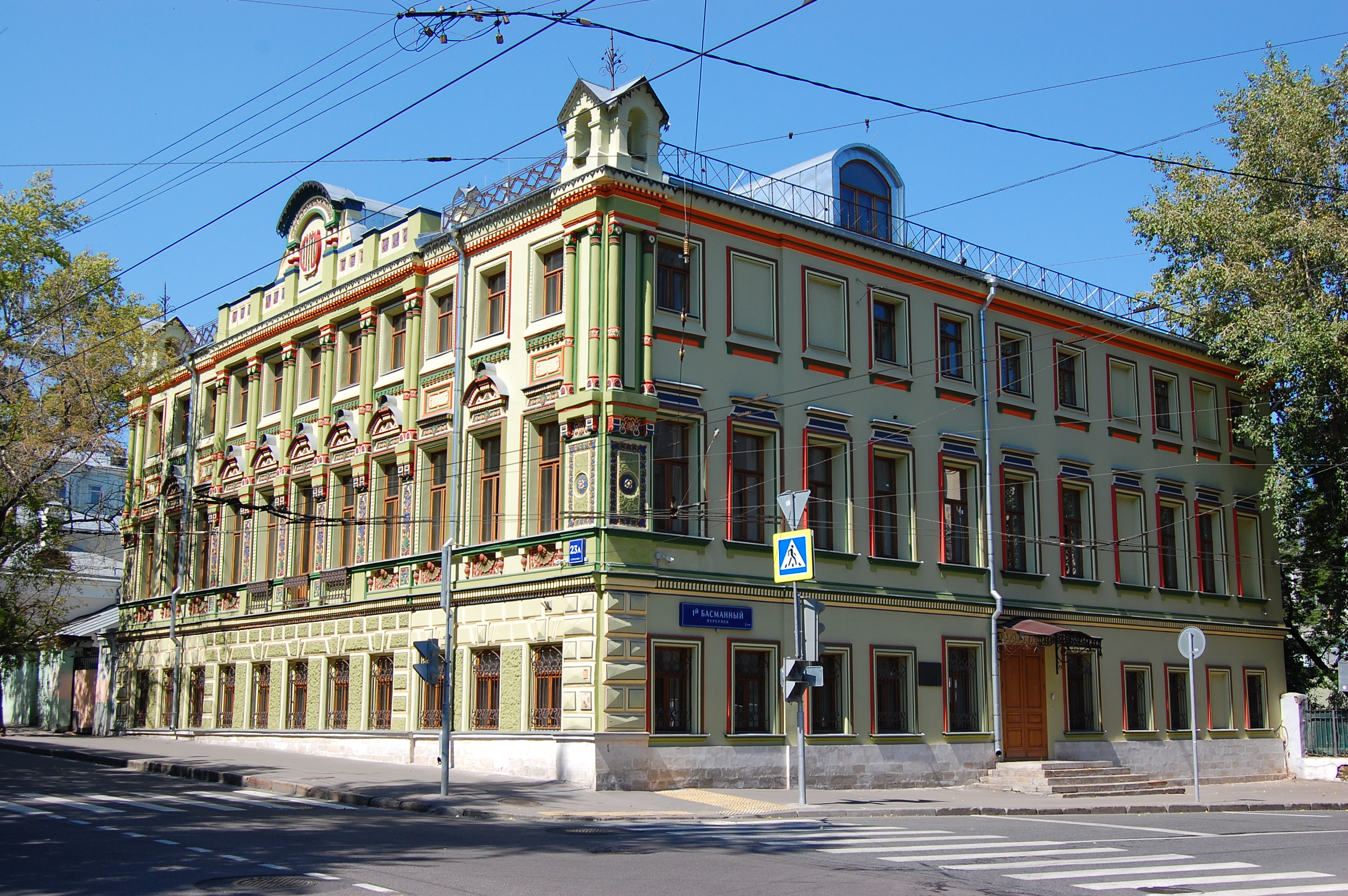 Усадьба Шибаевых